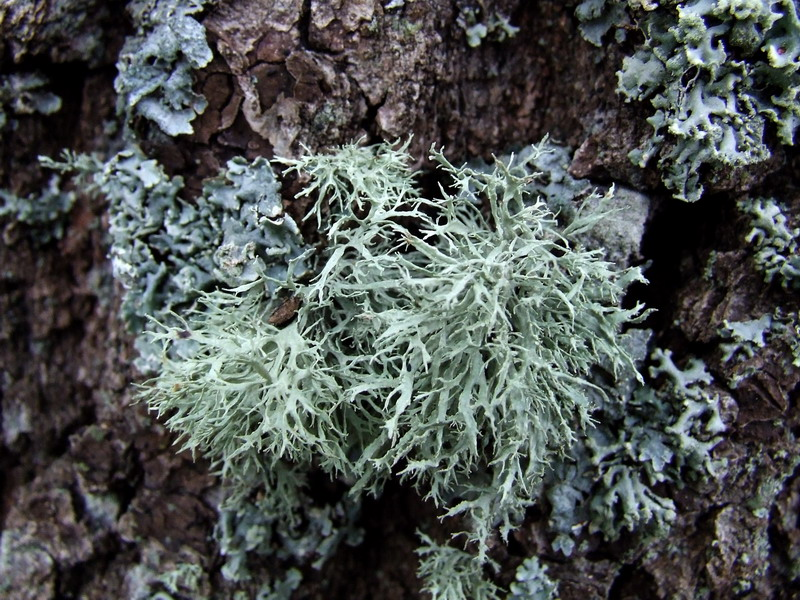 Evernia prunastri. Veseluvka, Jonava district, Lithuania.